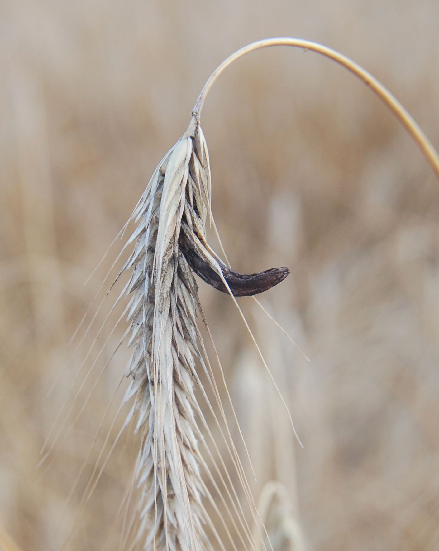 Mutterkorn an Roggen, Potsdam, Brandenburg